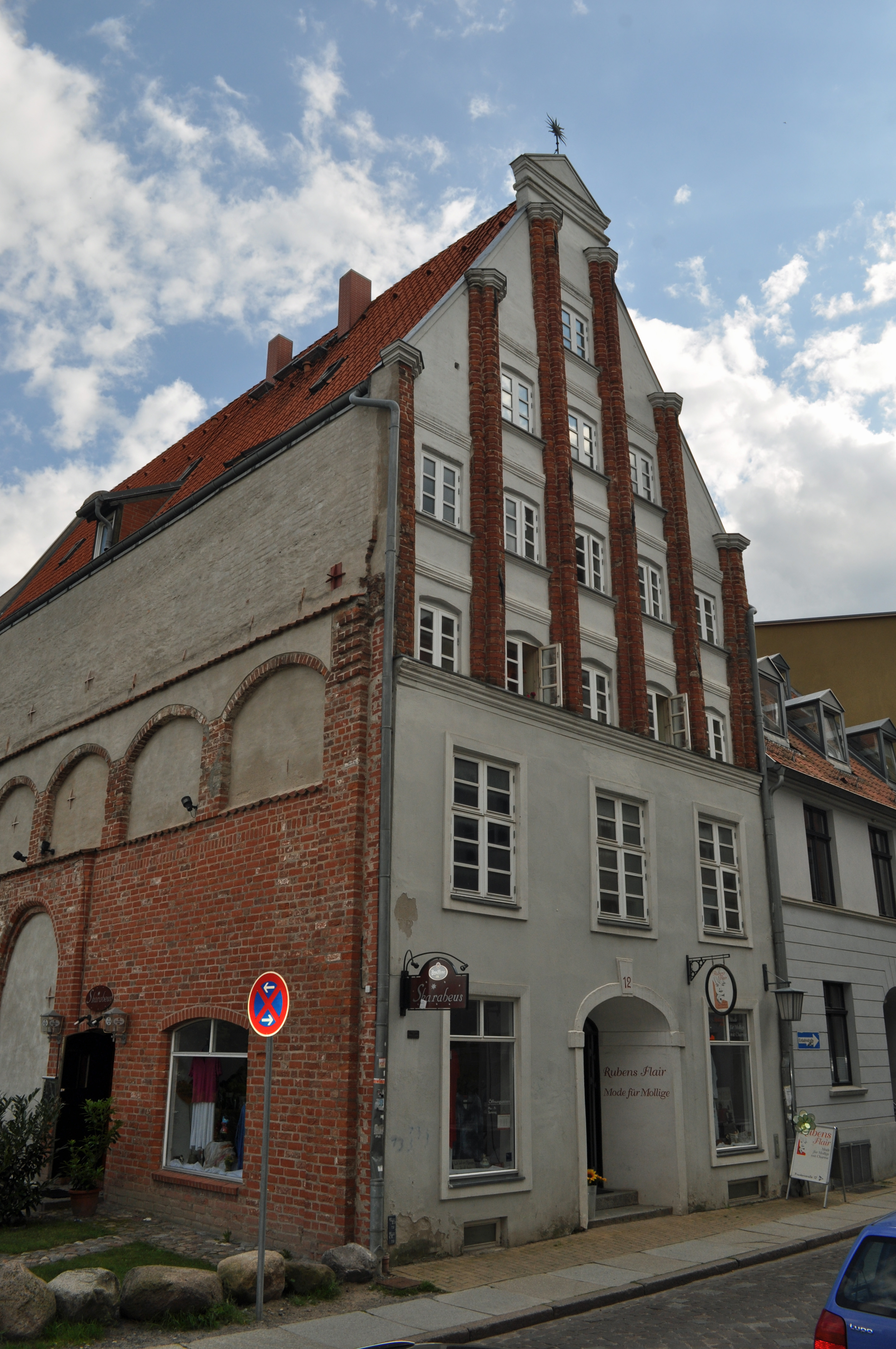 Das Foto zeigt ein Haus (bzw. Details des Hauses) in der Frankenstraße in Stralsund, Deutschland. Die Hausnummer steht im Dateinamen. Aufgenommen am 19. Juli 2011 vom Benutzer:Klugschnacker.